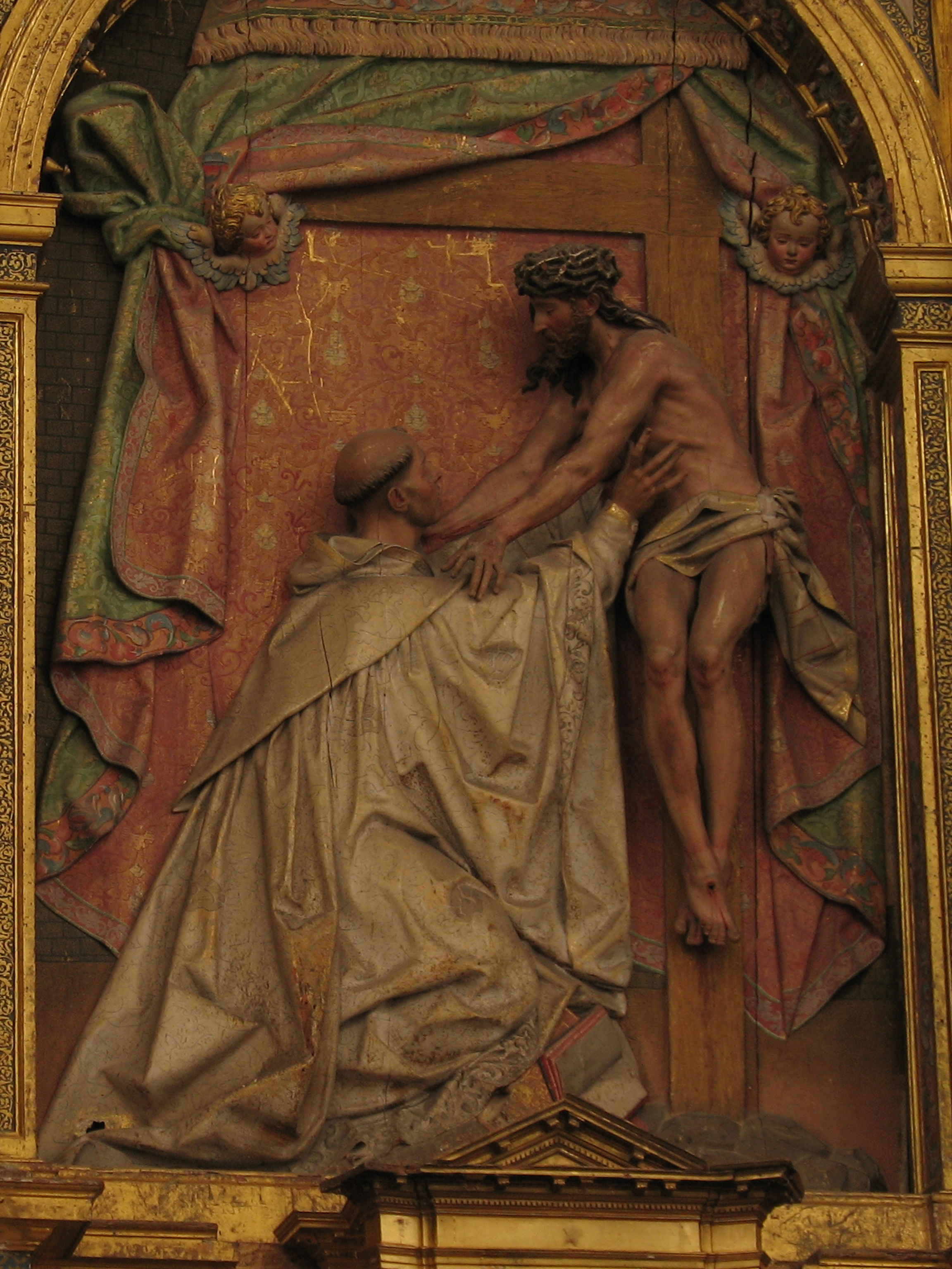 Retablo mayor. Iglesia del Monasterio de las Huelgas Reales (Valladolid)